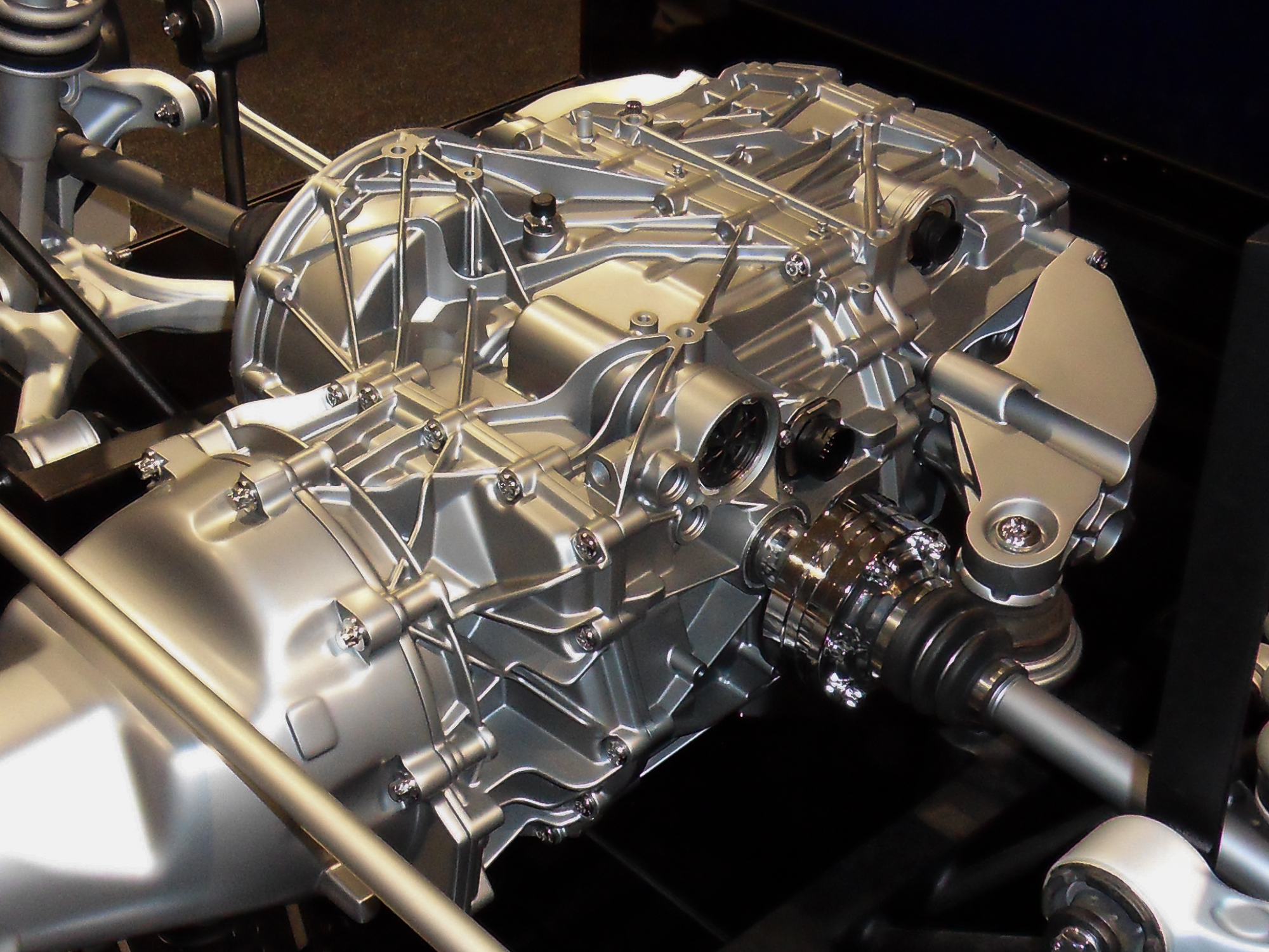 Das Siebengang-Doppelkupplungsgetriebe 7DCL750 des Herstellers Getrag, wie es im Mercedes-Benz SLS AMG und SLS AMG Roadster zum Einsatz kommt. Ausgestellt auf der Internationalen Automobilausstellung 2009 in Frankfurt am Main.